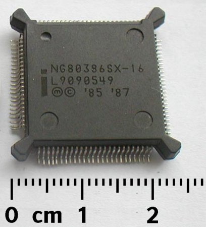 Procesor Intel 386sx (pro srovnání velikosti s 50 Kč).